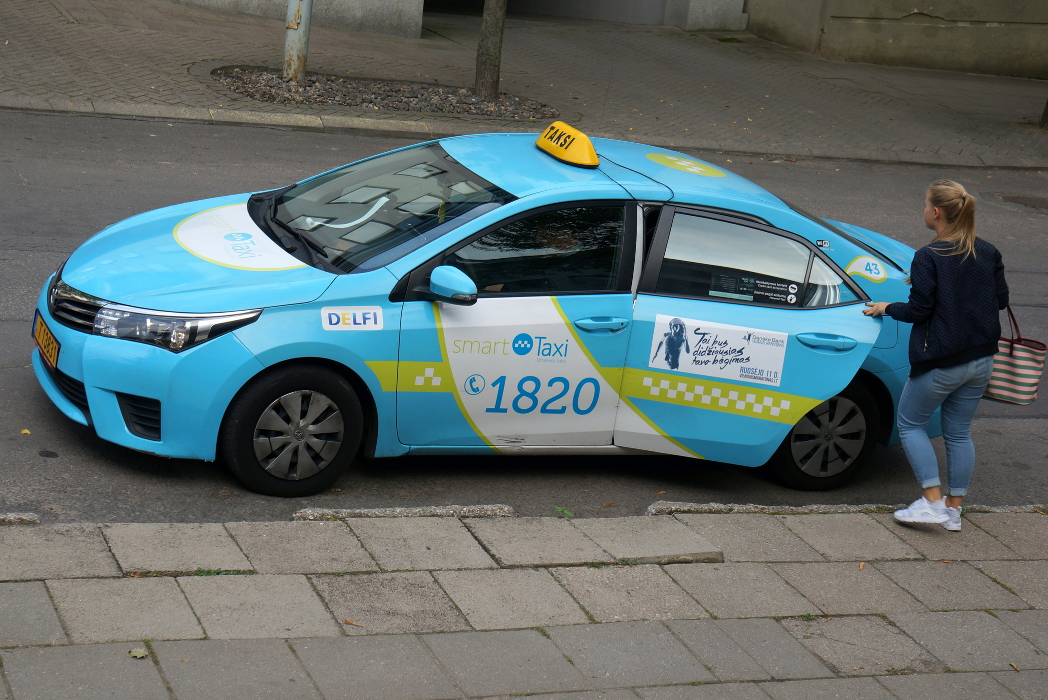 Wileńska taksówka operatora Smart Taxi